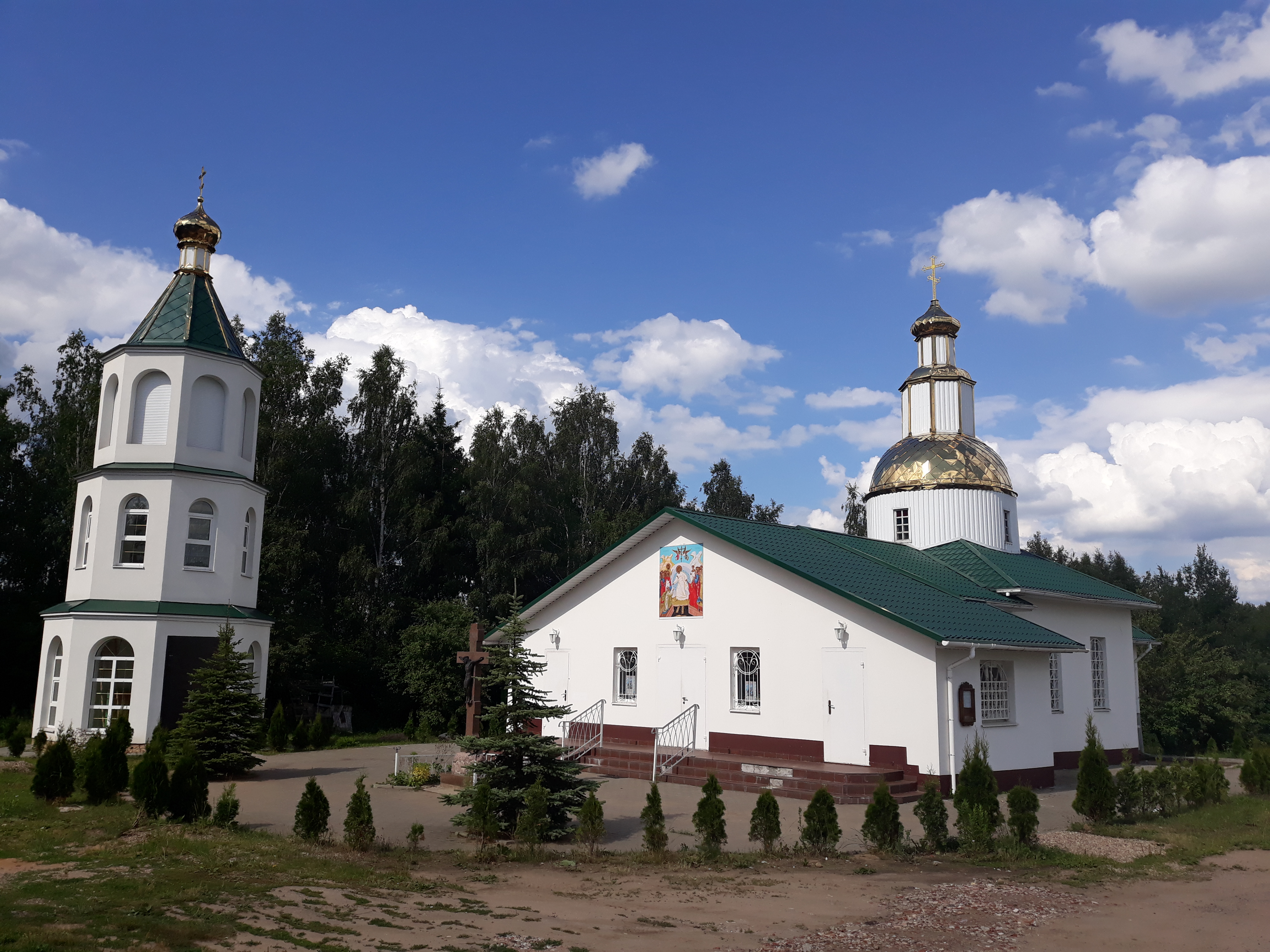 Храм Нараджэння Хрыстовага, Задомля